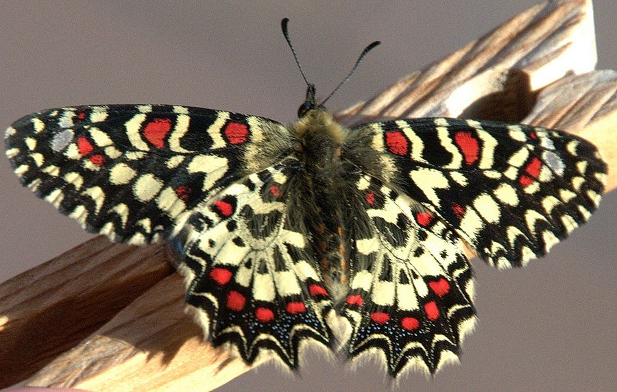 papillon / borboleta / butterfly